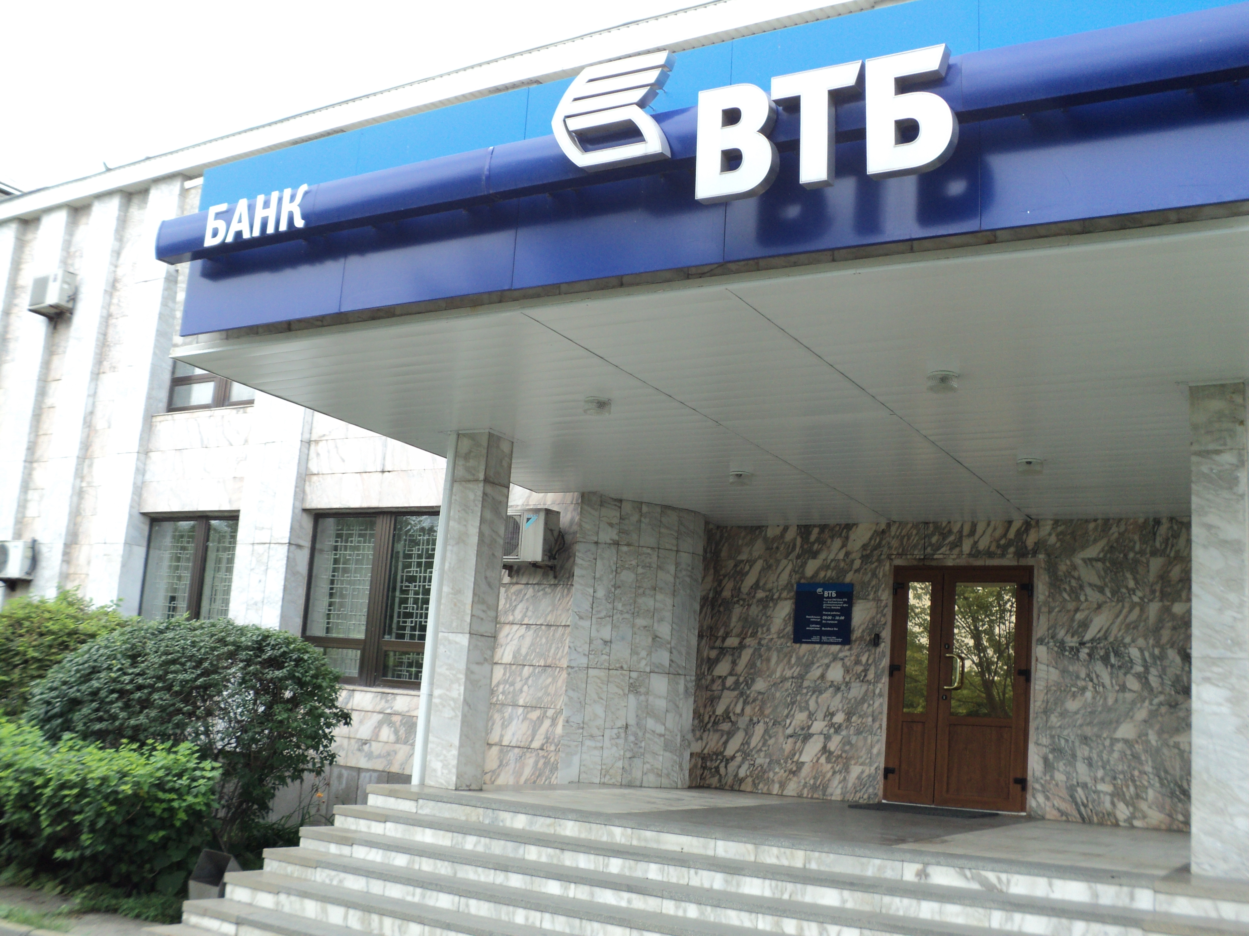 Банк ВТБ в Находке